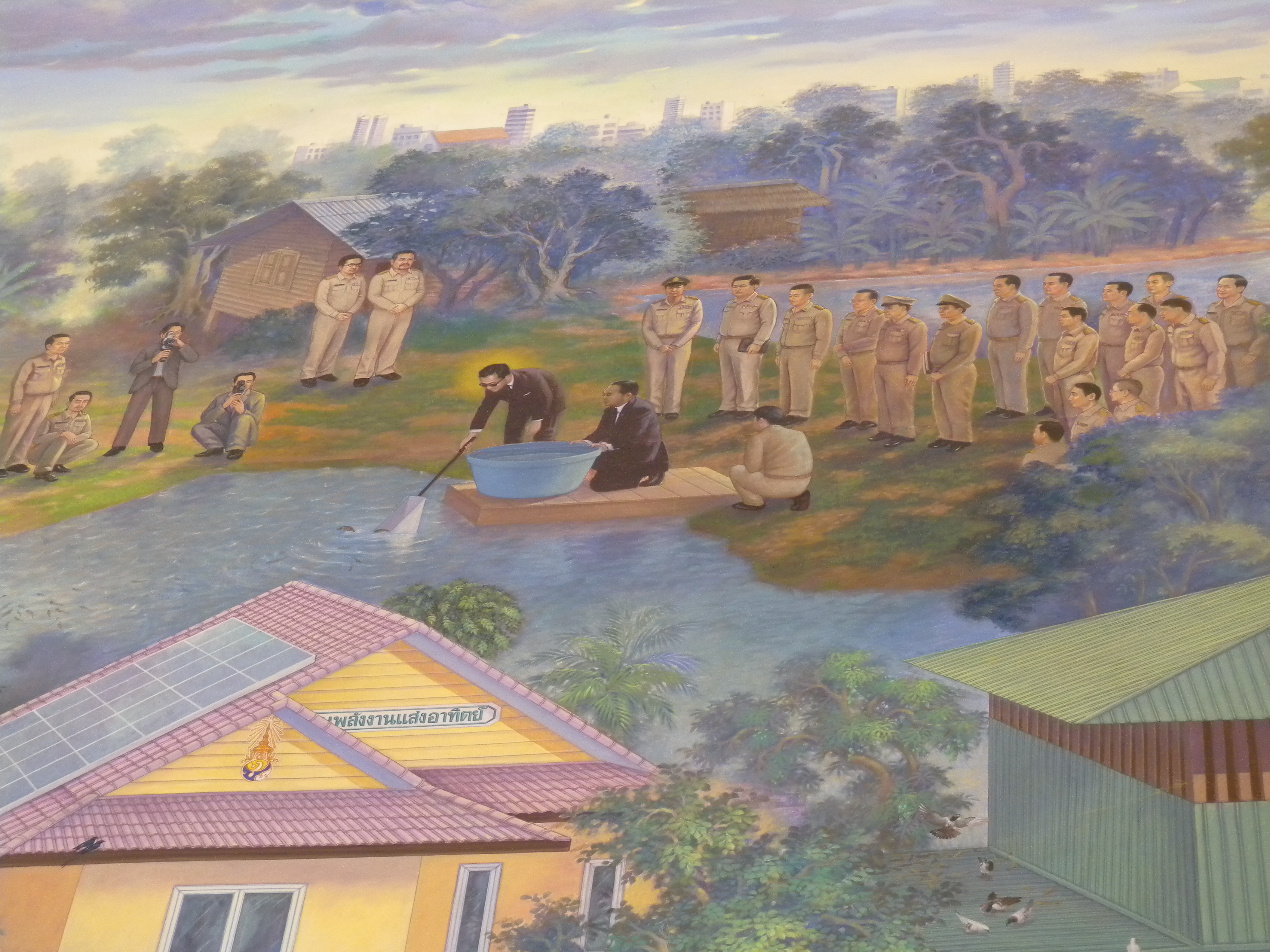 จิตรกรรมฝาผนังเล่าเรื่องโครงการในพระราชดำริ โครงการอันเนื่องมาจากพระราชดำริ และโครงการส่วนพระองค์ในพระบาทสมเด็จพระปรมินทรมหาภูมิพลอดุลยเดช ภายในพระที่นั่งทรงธรรม มณฑลพระราชพิธีถวายพระเพลิงพระบรมศพพระบาทสมเด็จพระปรมินทรมหาภูมิพลอดุลยเดช ในภาพนี้ แสดงภาพการขยายพันธุ์ปลานิล (Tilapia Nilotica) ภายในโครงการส่วนพระองค์สวนจิตรลดา